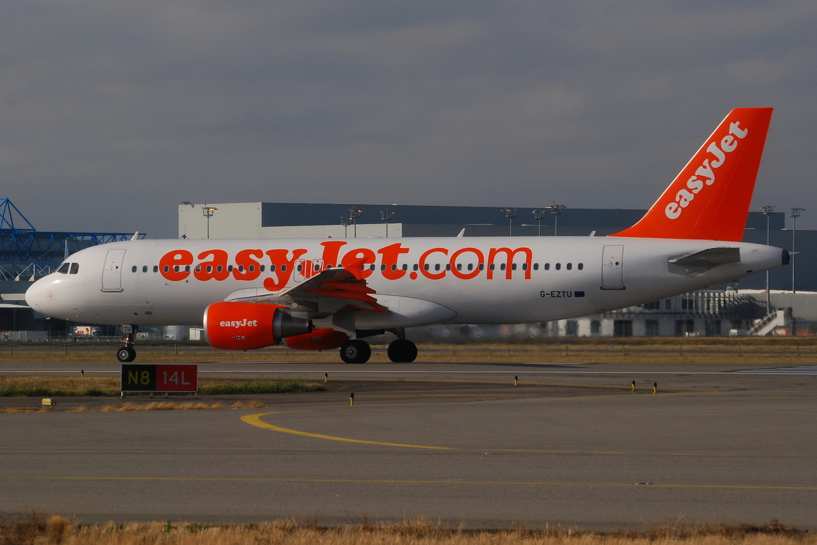 Photo prise à l'aéroport de Toulouse-Blagnac (LFBO) en France. Picture take at Toulouse-Blagnac Airport (LFBO) in France.